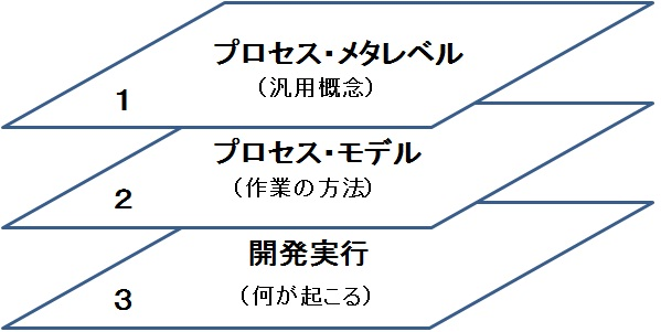 プロセスの抽象レベルの概念図